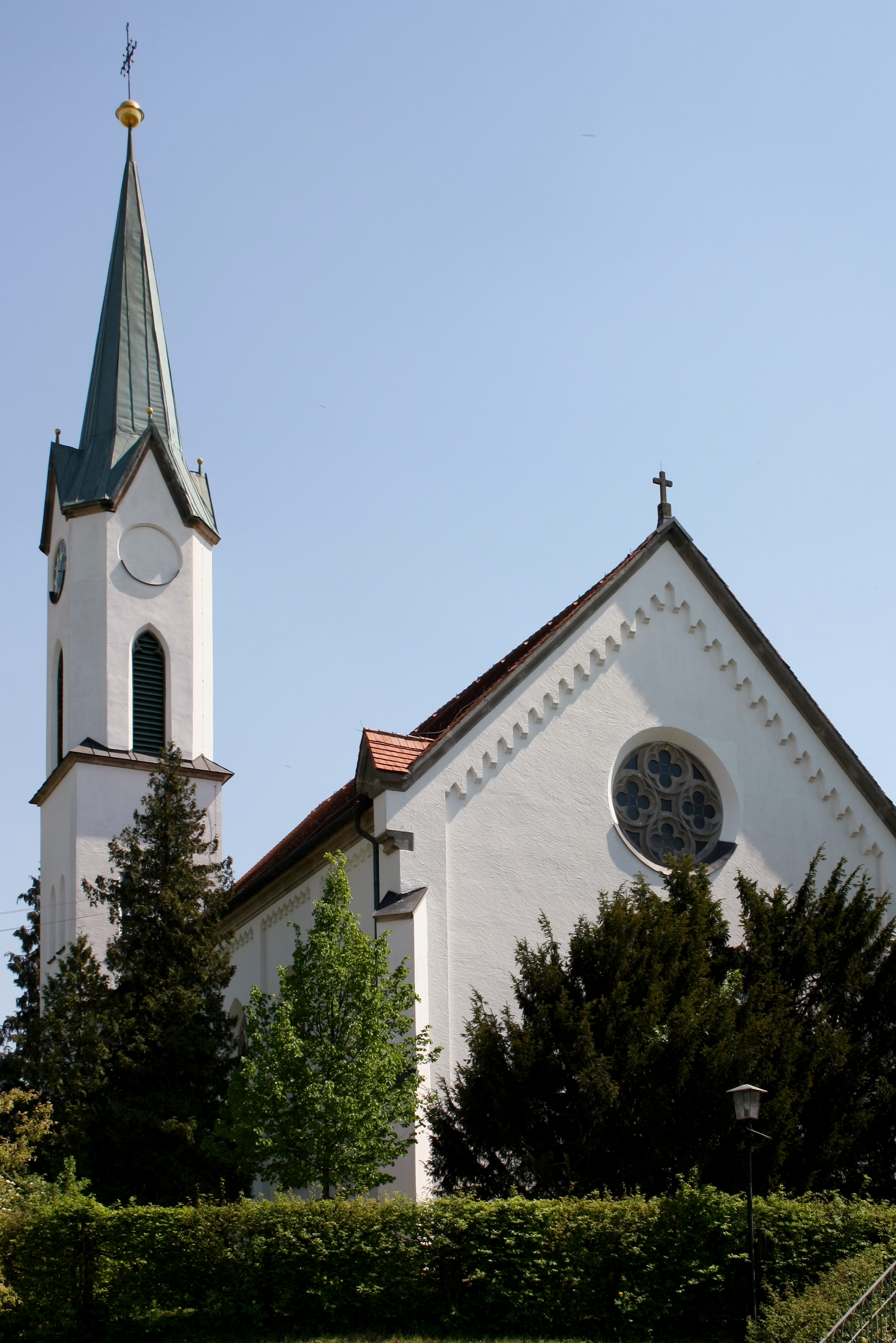 Katholische Pfarrkirche St. Martin in Staufen (Gemeinde Syrgenstein) im Landkreis Dillingen an der Donau, Ansicht von Westen